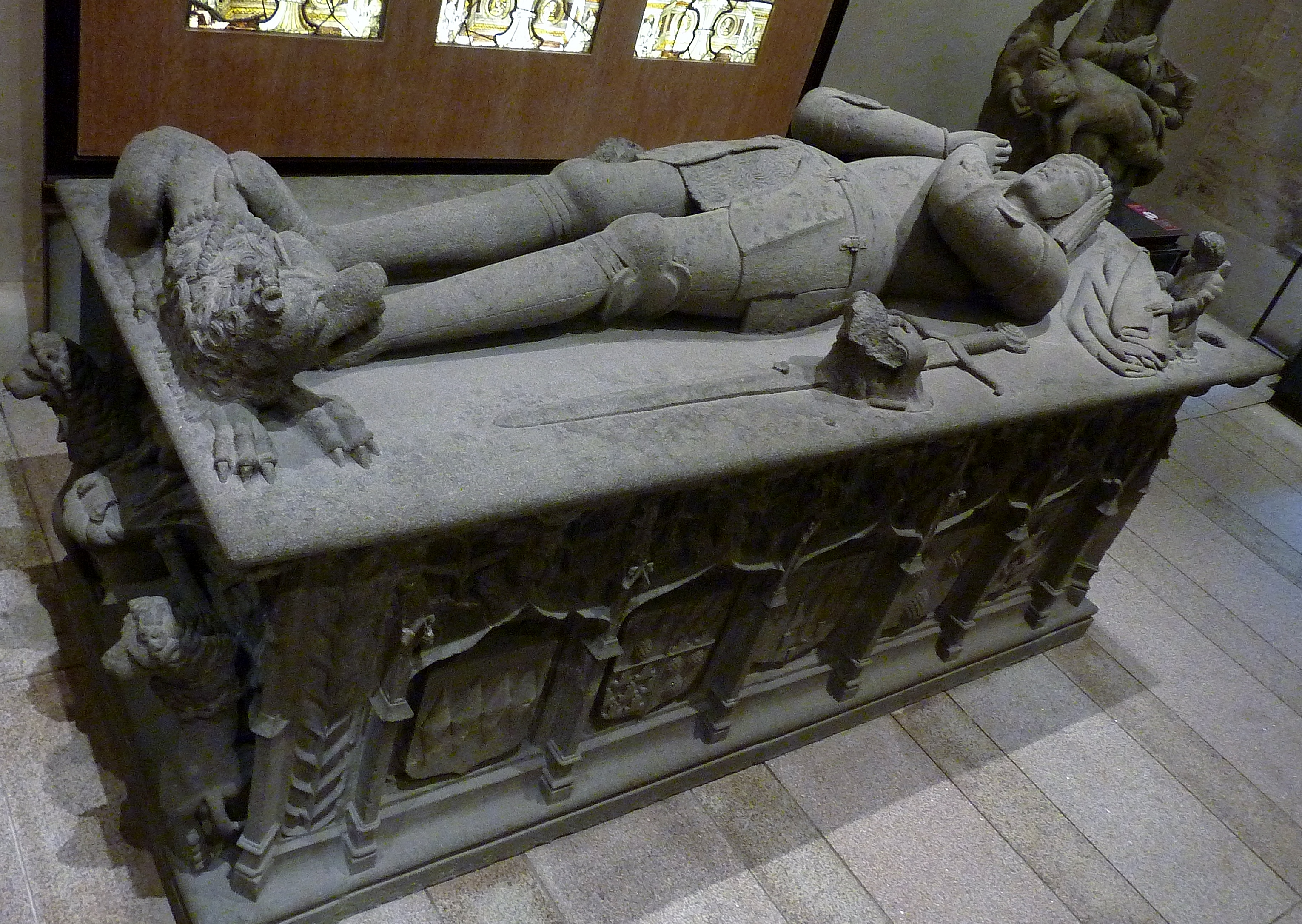 Tombeau de Troïlus de Mondragon (vers 1540, en kersantite, provient de la chapelle de Beuzit-Conogan près de Landerneau)